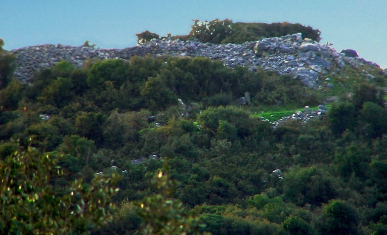 Το μεσαιωνικό κάστρο "Καστρί"